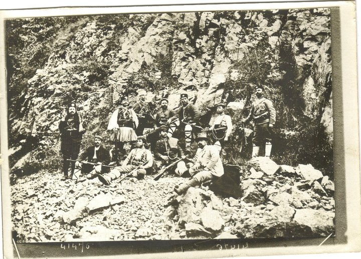 Четата на Христо Чернопеев